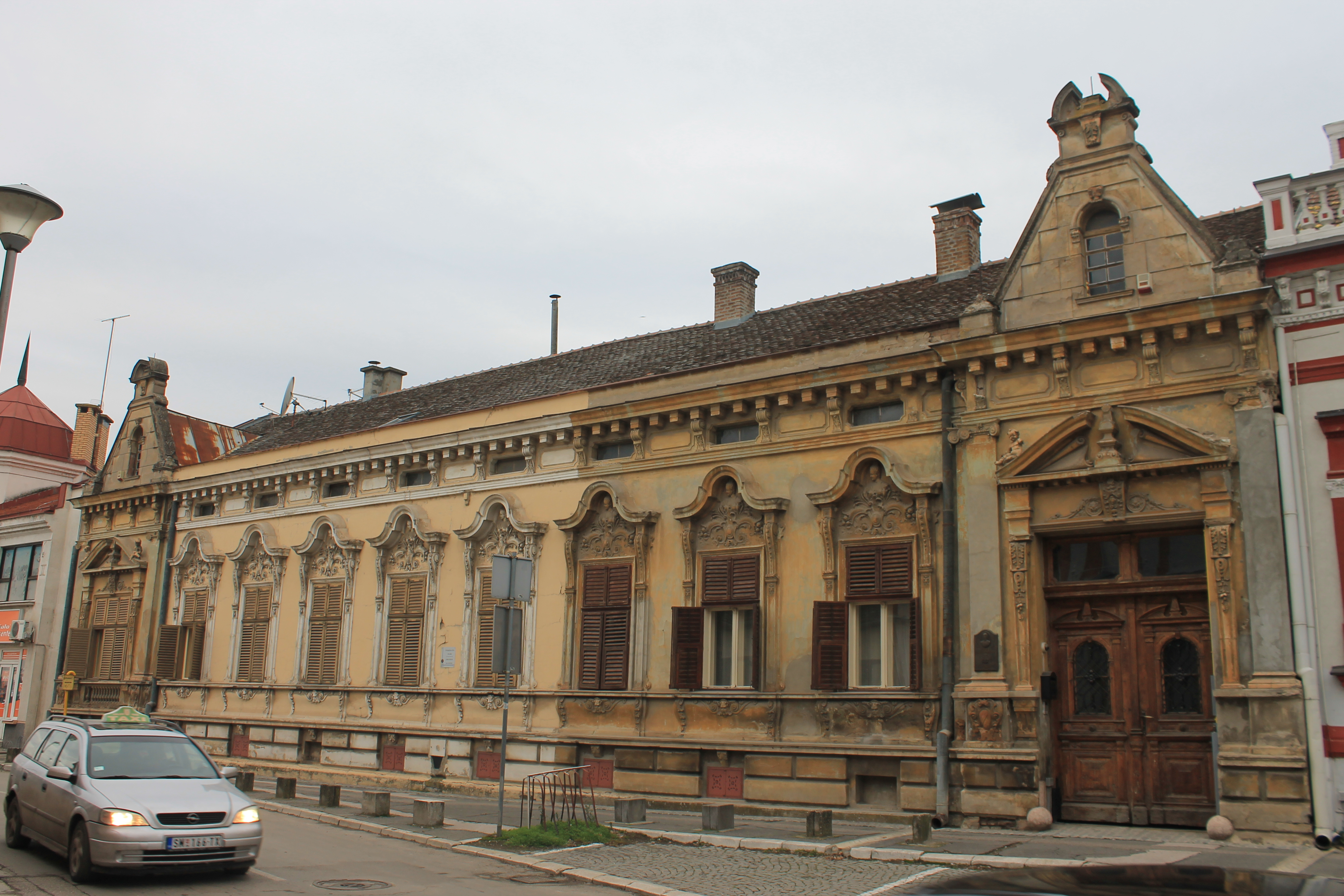 Žitni trg, Sremska Mitrovica